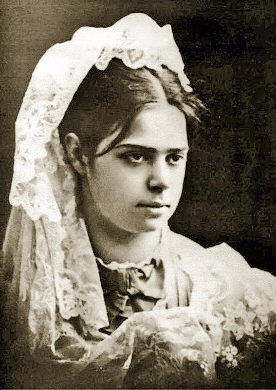 Evlalija Pavlovna Kadmina